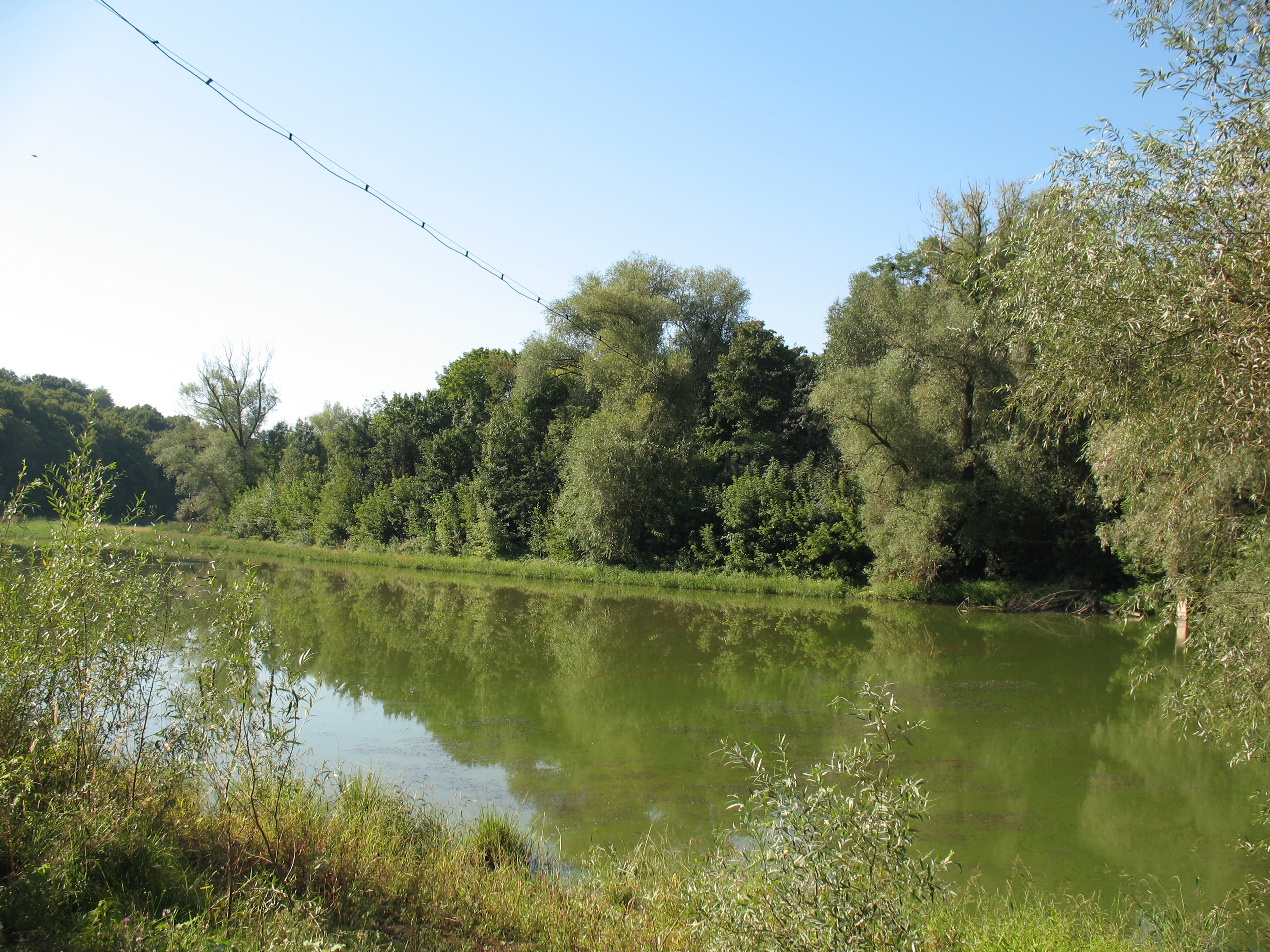 Сидорівський парк, Корсунь-Шевченківський район, с. Сидорівка